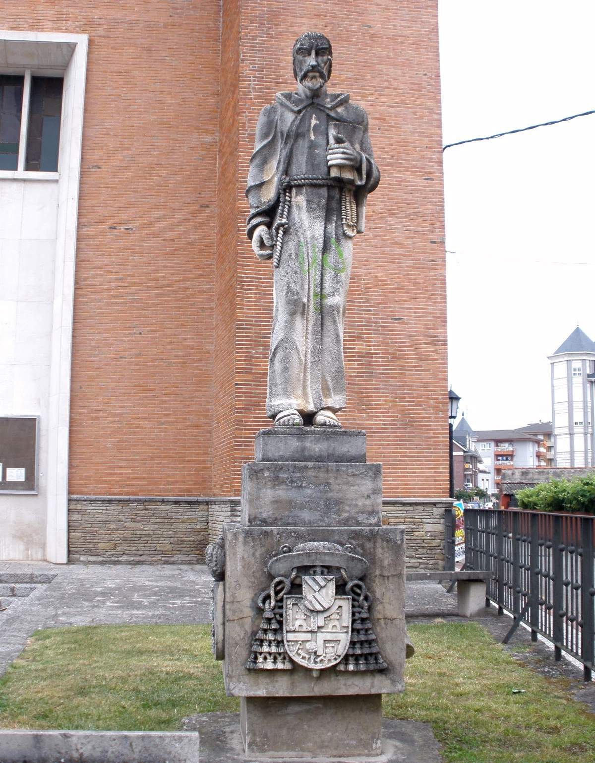 Colindres (Cantabria) - Monumento a Fray Pablo de Colindres